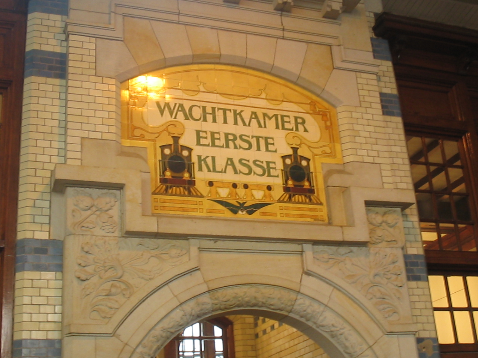 wachtkamer eerste klasse op Haarlem, januari 2006